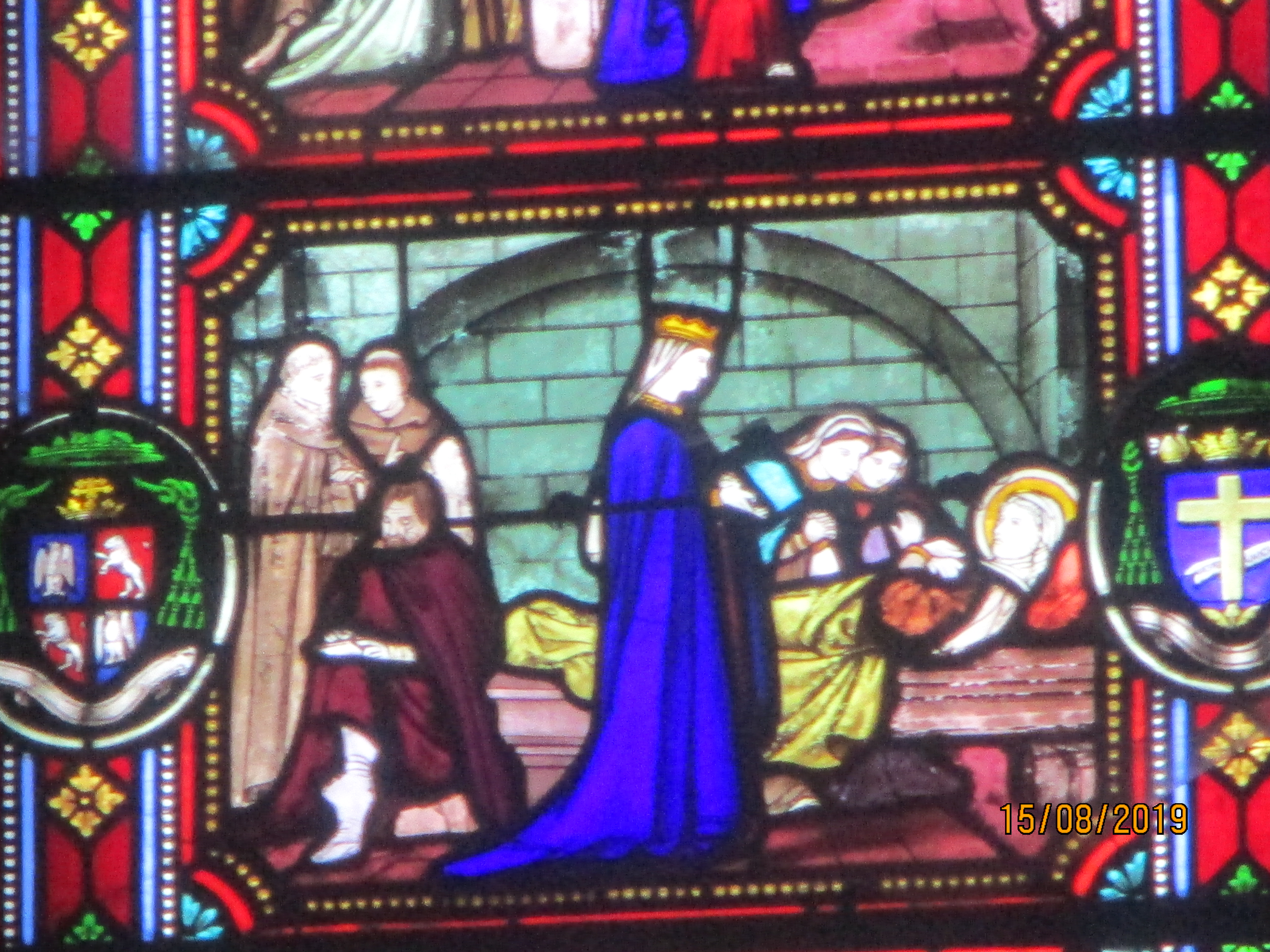 Vitrail de l'église de Cudot : la reine douairière de France, Alix (Adèle) de Champagne, veuve de Louis VII, rend visite à sainte Alpais.